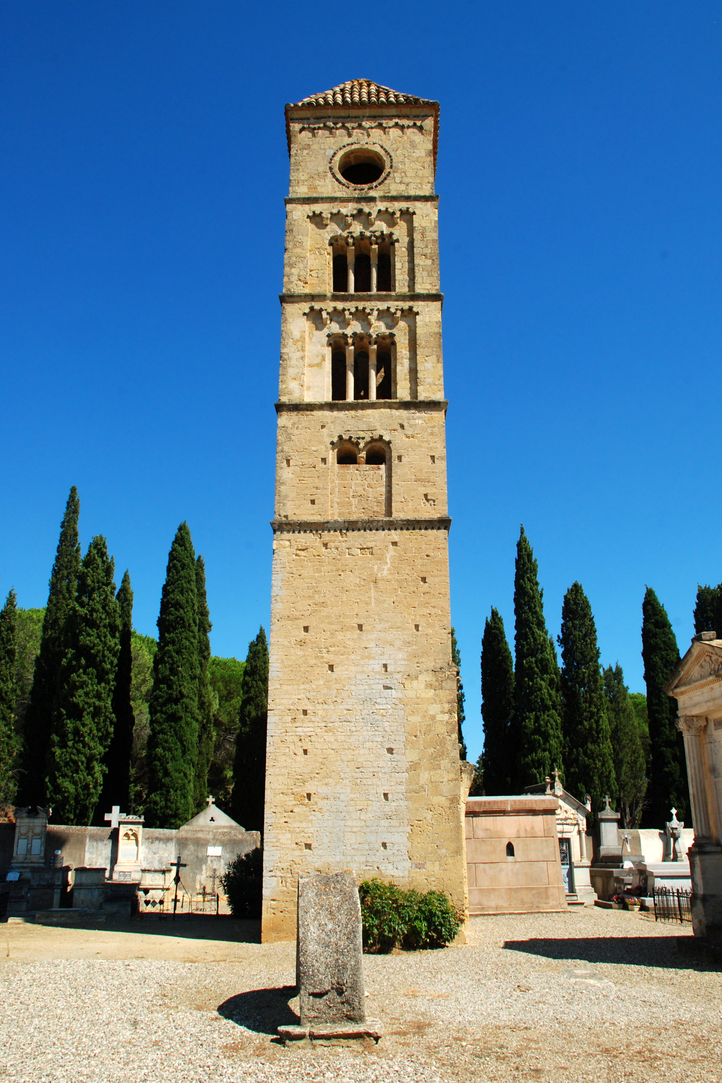 France - Languedoc - Hérault - Puissalicon - ancienne église Saint-Étienne de Pezan - tour romane .